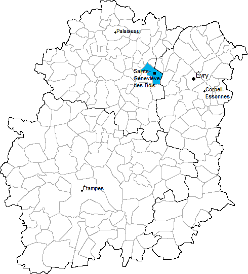 Carte de situation du canton de Sainte-Geneviève-des-Bois en Essonne (91)